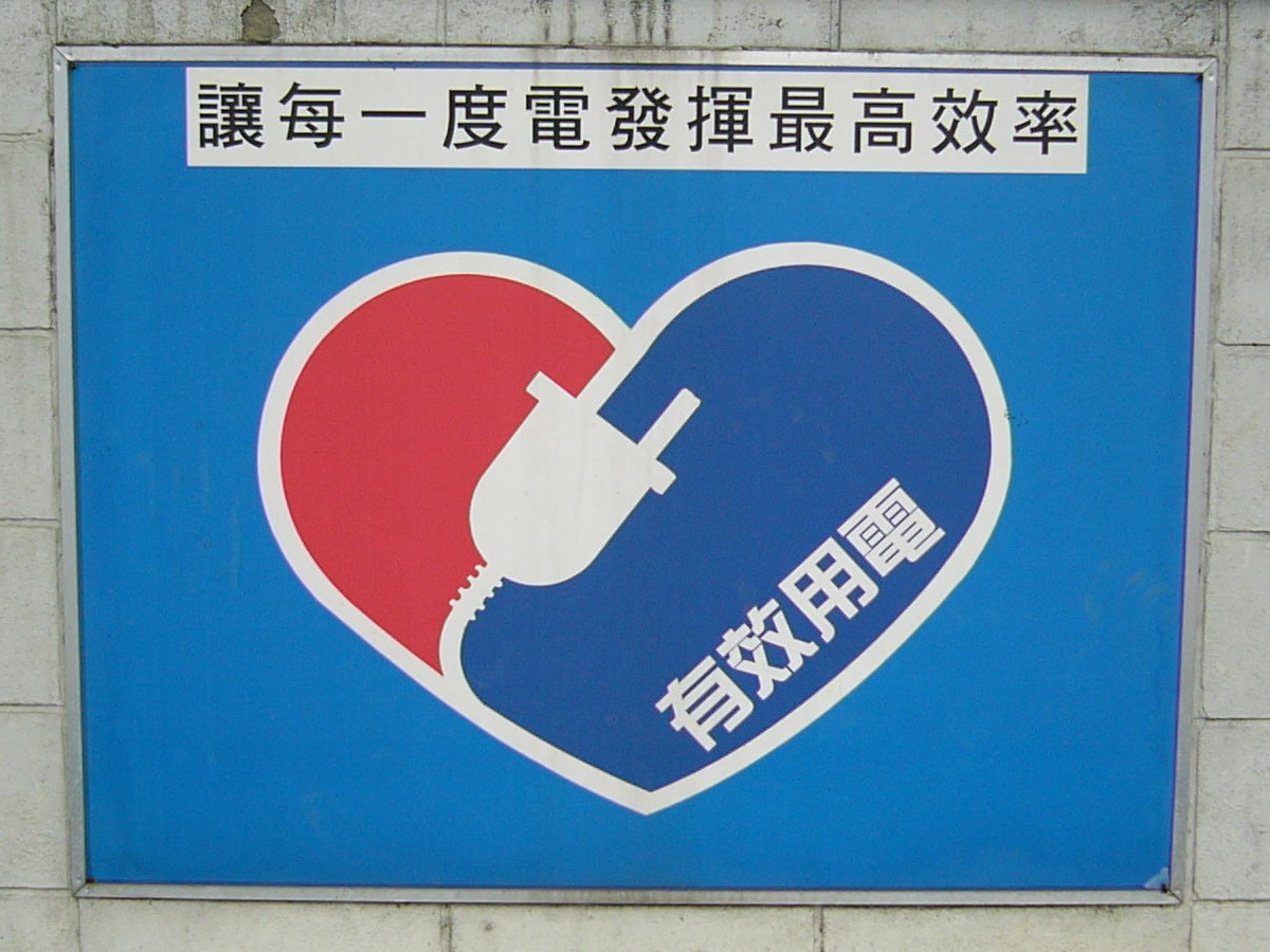 中文（台灣）: 台灣電力公司台北北區營業處圍牆上的「有效用電」宣導標誌牌，上方標示「讓每一度電發揮最高效率」。